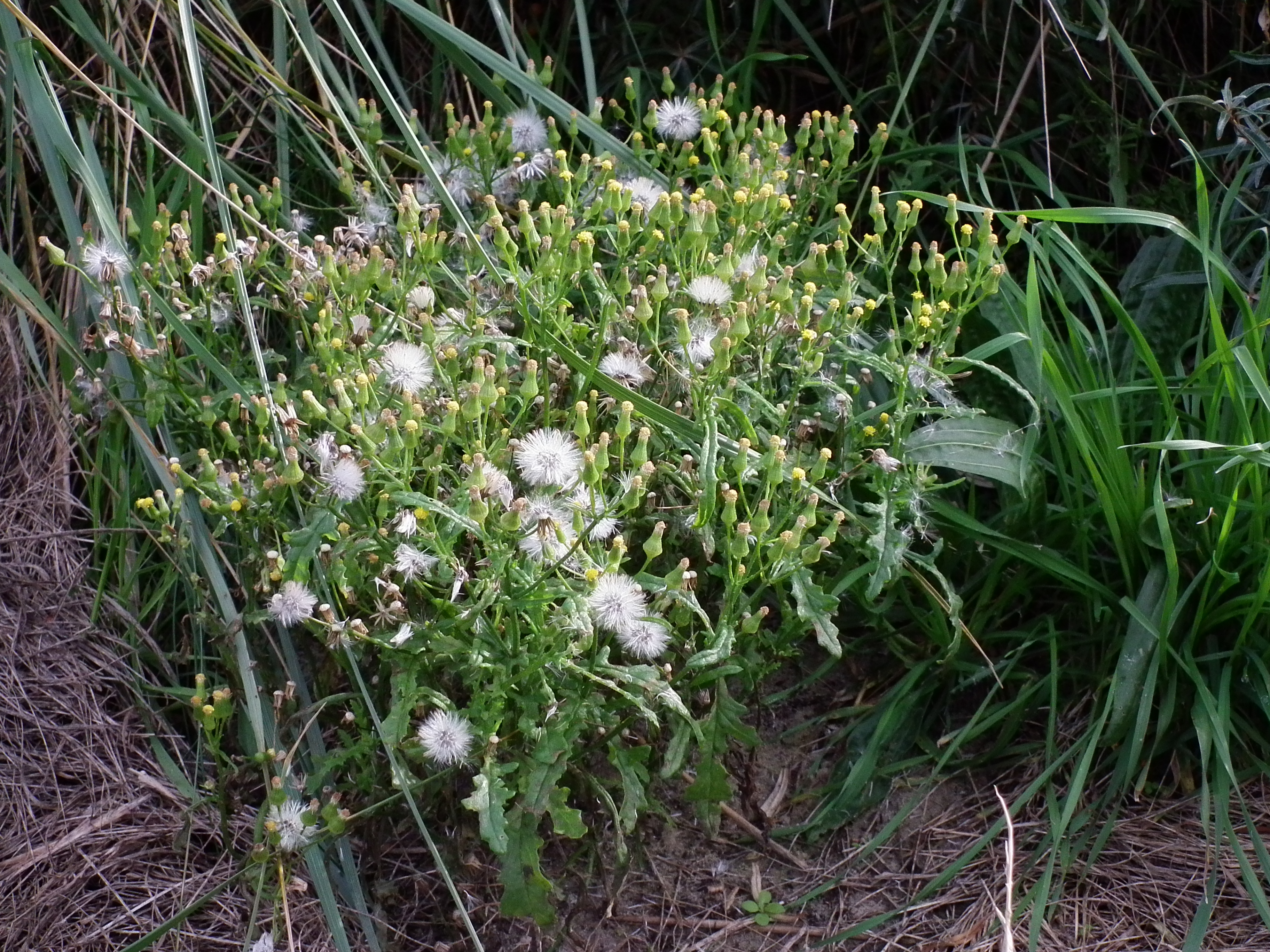 Verblühendes Wald-Greiskraut Senecio sylvaticus, fotografiert auf der ostfriesischen Nordseeinsel Juist (Niedersachsen, Deutschland)